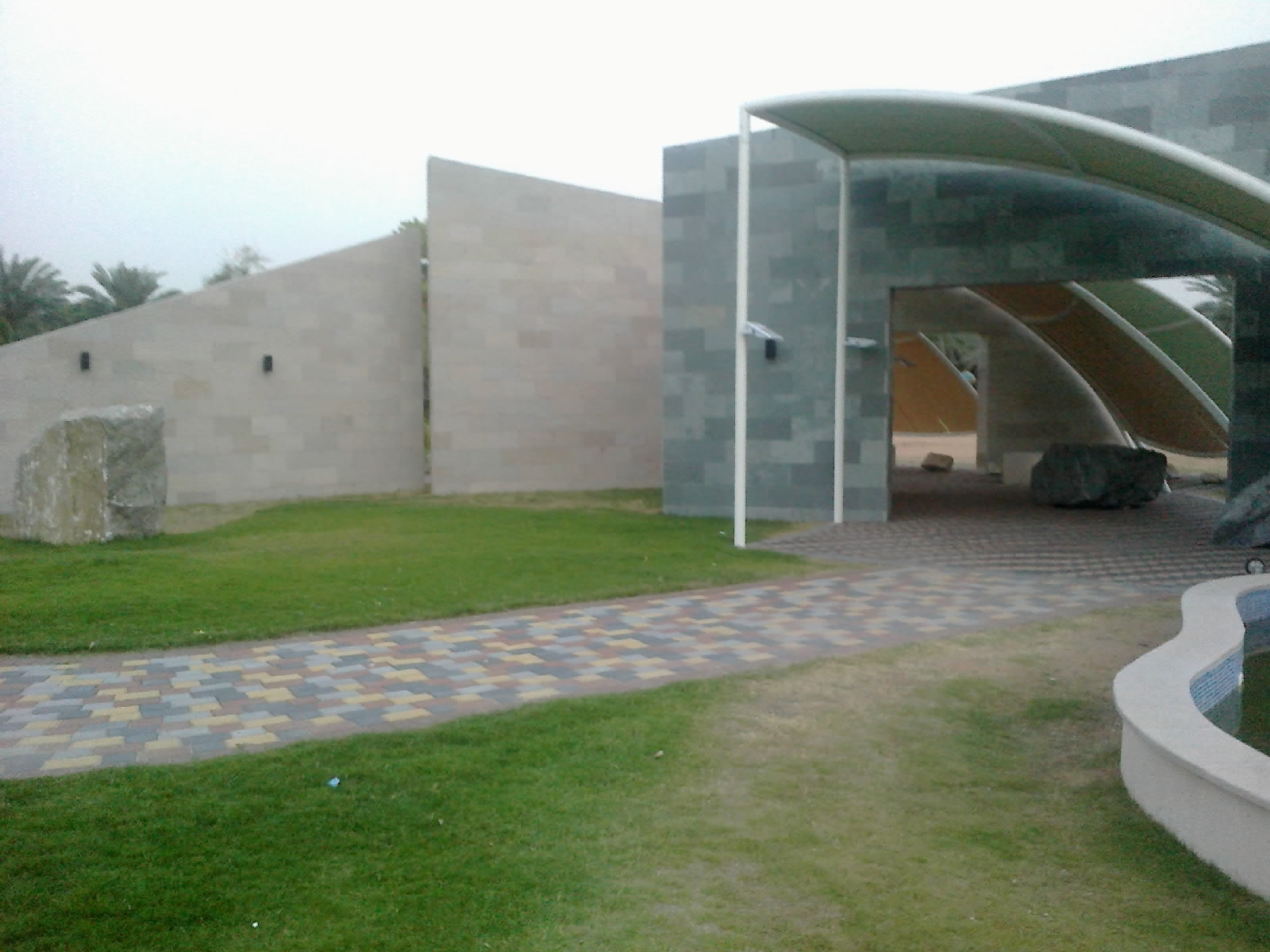 الحديقةالجيولوجية داخل حديقة الجاهلي في مدينة العين والتي فيها صخور من كافة انحاء الامارات تم انشائها عام ٢٠١٤ بتصميم جميل